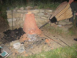 Forn de cubeta en funcionament a l’ÀREA de l’Esquerda (Roda de Ter, Osona)